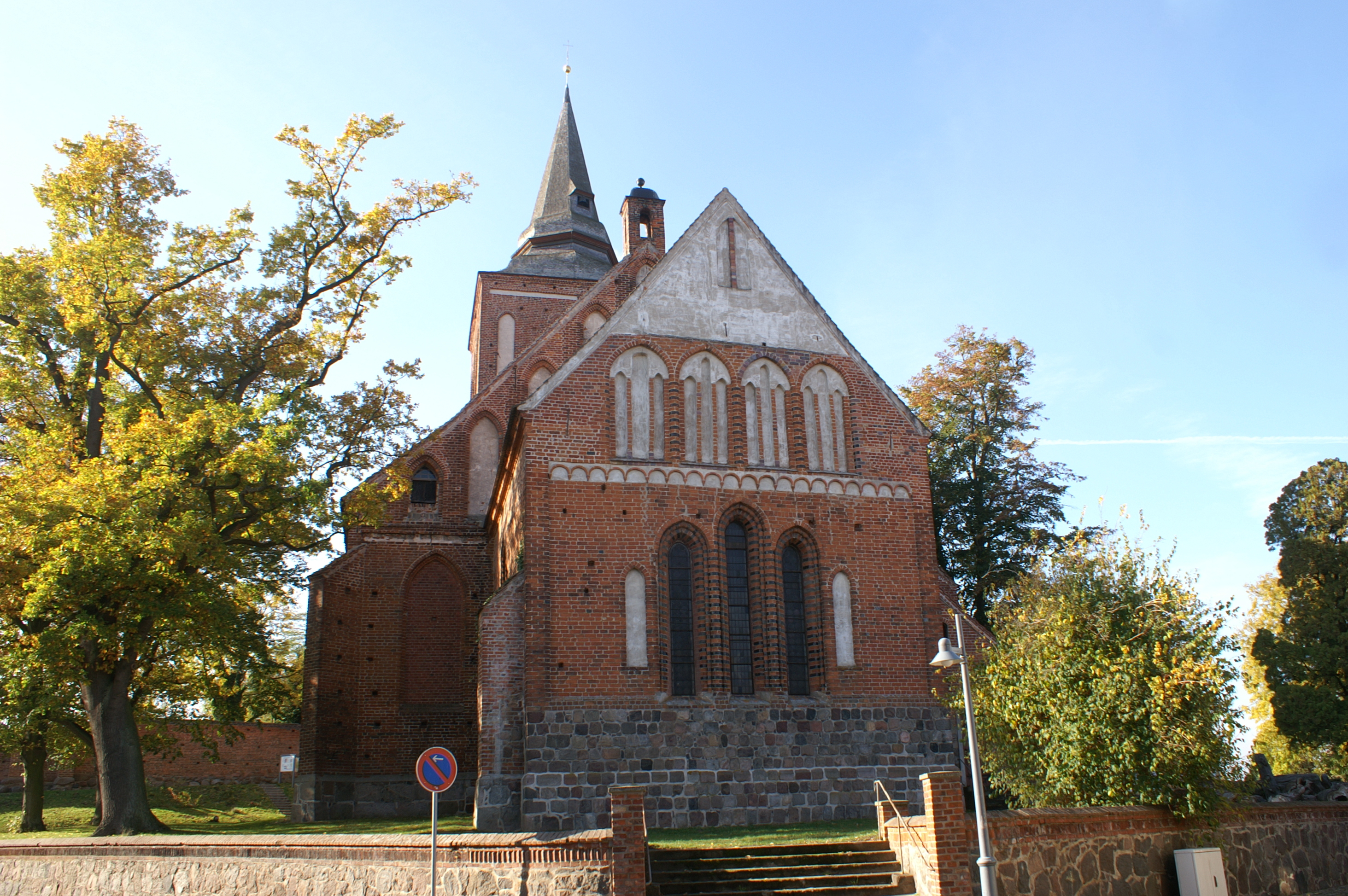 Ostgiebel und Chor der Kirche St. Johannis in Lassan